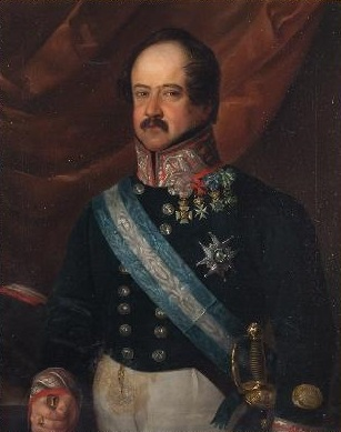 Retrato del militar y aristócrata español Joaquín Fernández de Córdoba (1787-1873), que fue duque de Arión y marqués de Malpica y de Mancera.